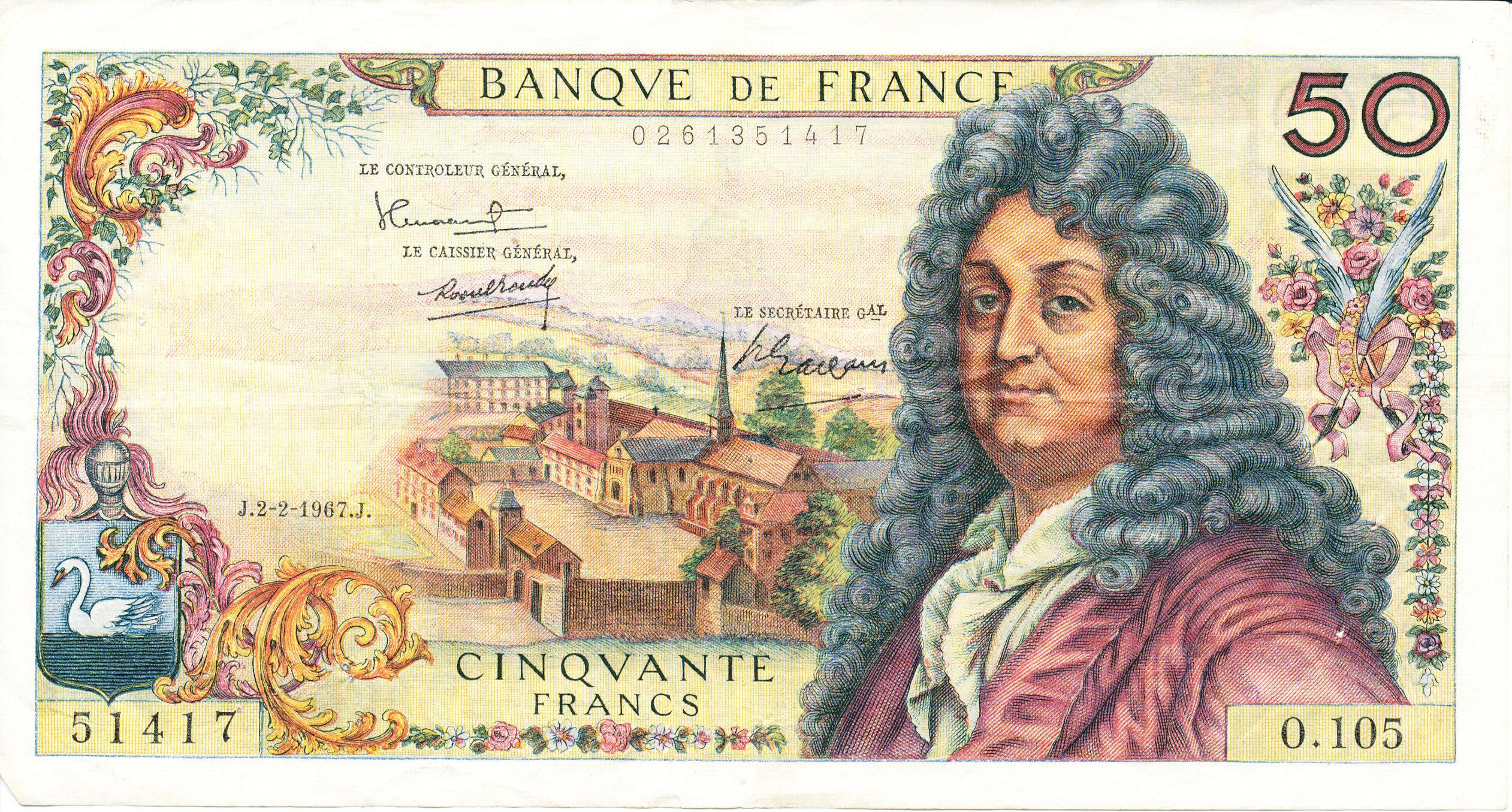 recto d'un billet de 50 francs de 1967